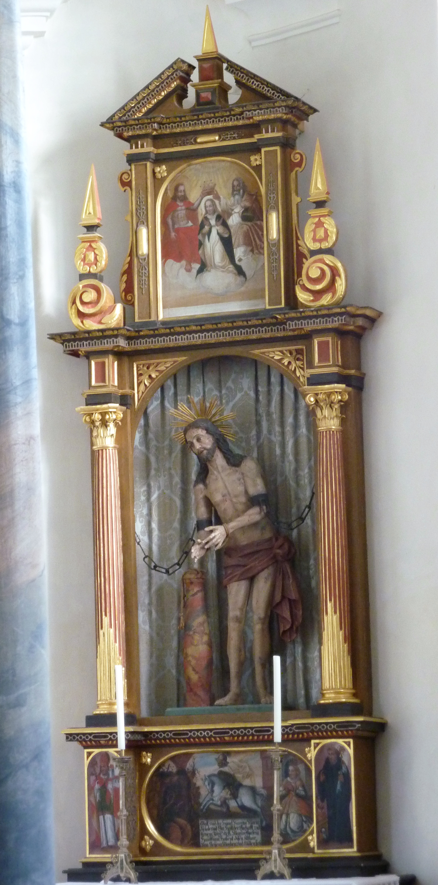 Katholische Kapelle St. Lorenz in Epfach (Denklingen) im Landkreis Landsberg am Lech (Bayern/Deutschland), Geißelchristus aus dem 18. Jahrhundert, Kopie der Figur in der Wieskirche